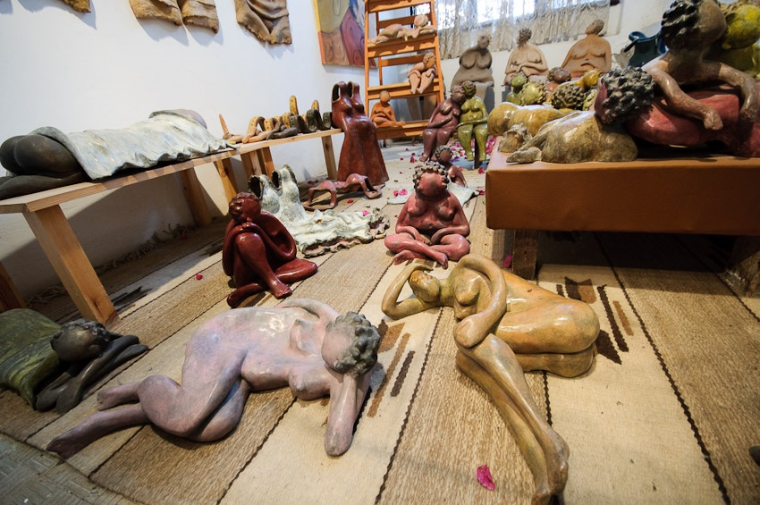 הנשמה שבחומר